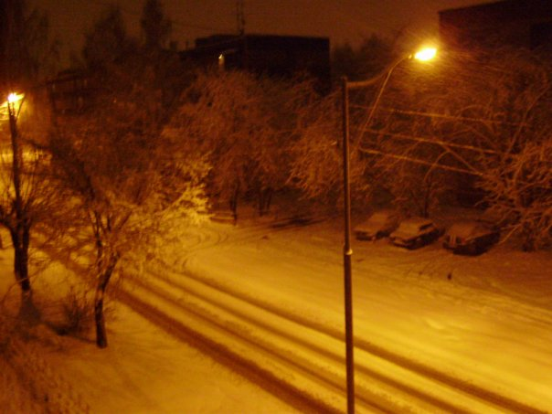 фотография улицы Сортировочная